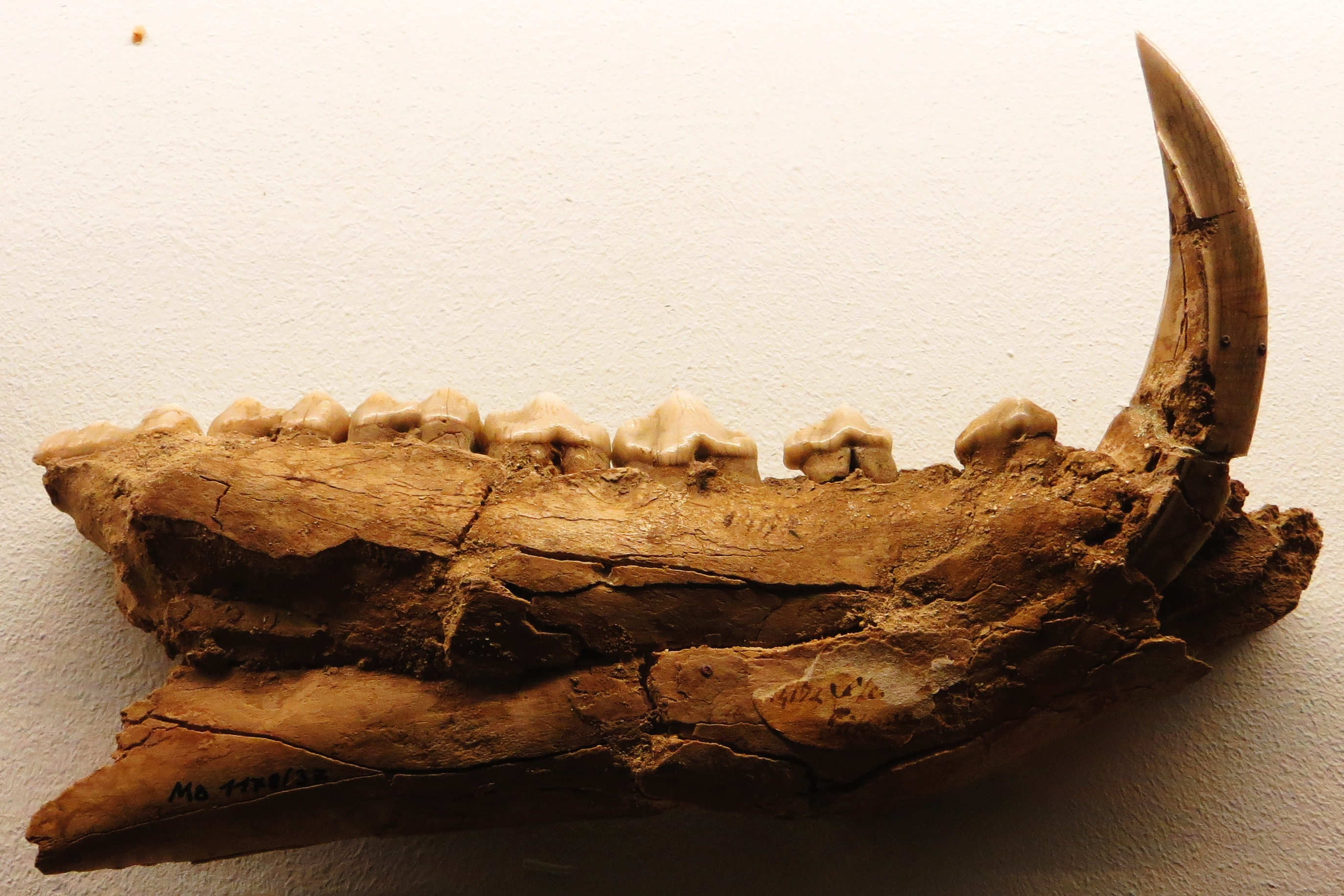 Fossil of Conohyus, an extinct mammal - Took the picture at Museum of Paleontology, Tuebingen